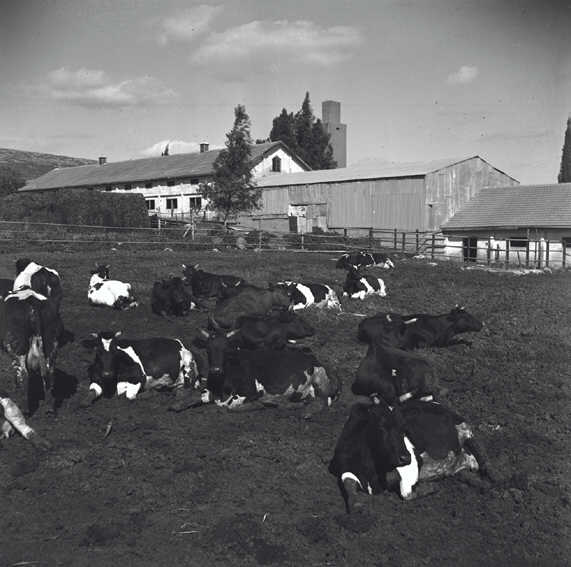 הרפת בקיבוץ תל-יוסף